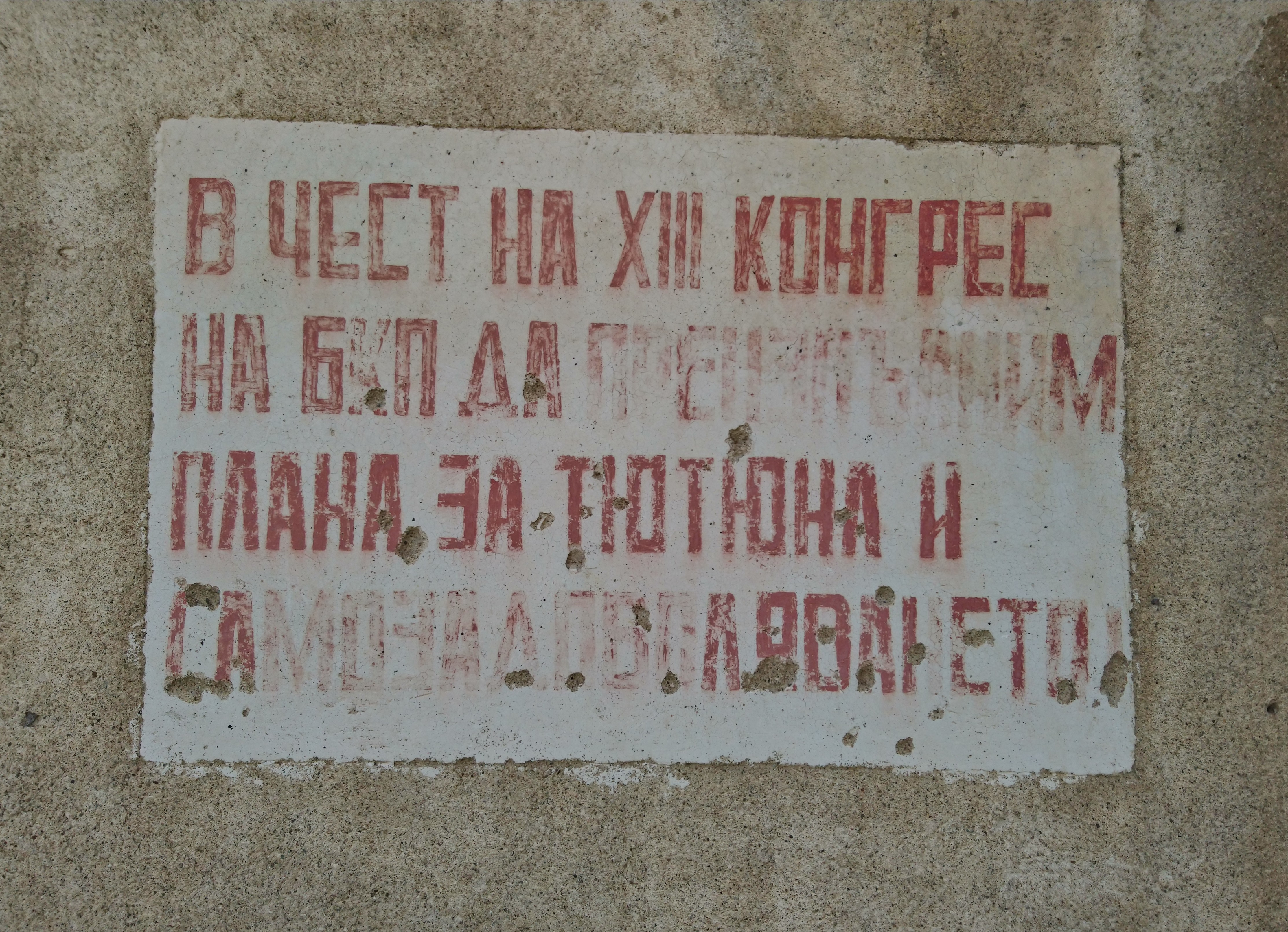 Социалистически лозунг в село Казак